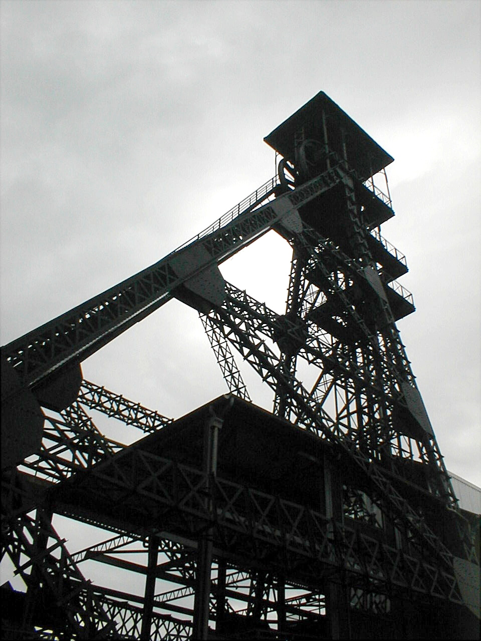 Vue du chassi à molette du Bois du Cazier 7